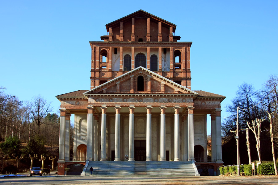 Facciata del Santuario del Crocefisso di Boca (NO)